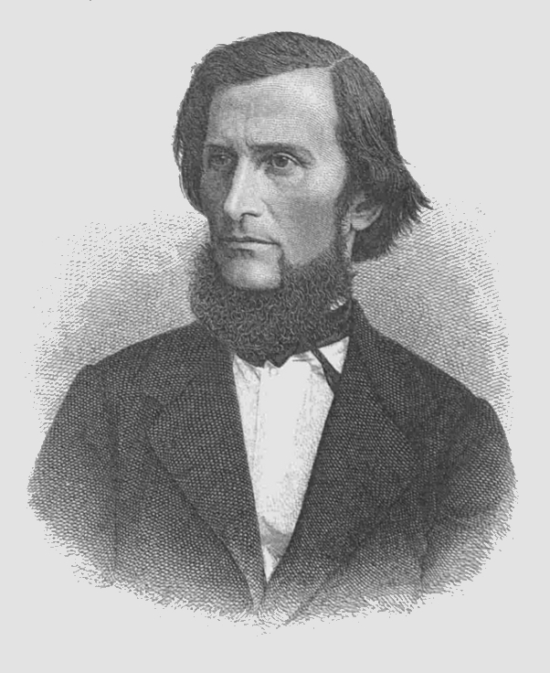 Константин Дмитриевич Ушинский, русский теоретик педагогики